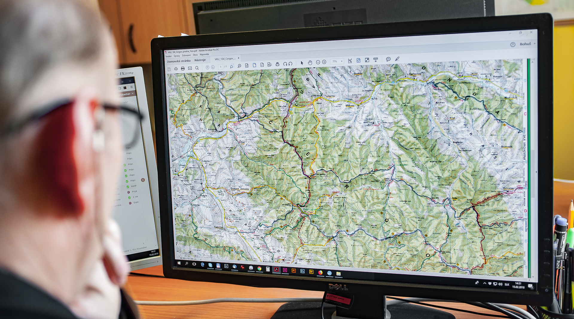 Kartograf pri práci na aktualizácii turistickej mapy VKÚ Harmanec.